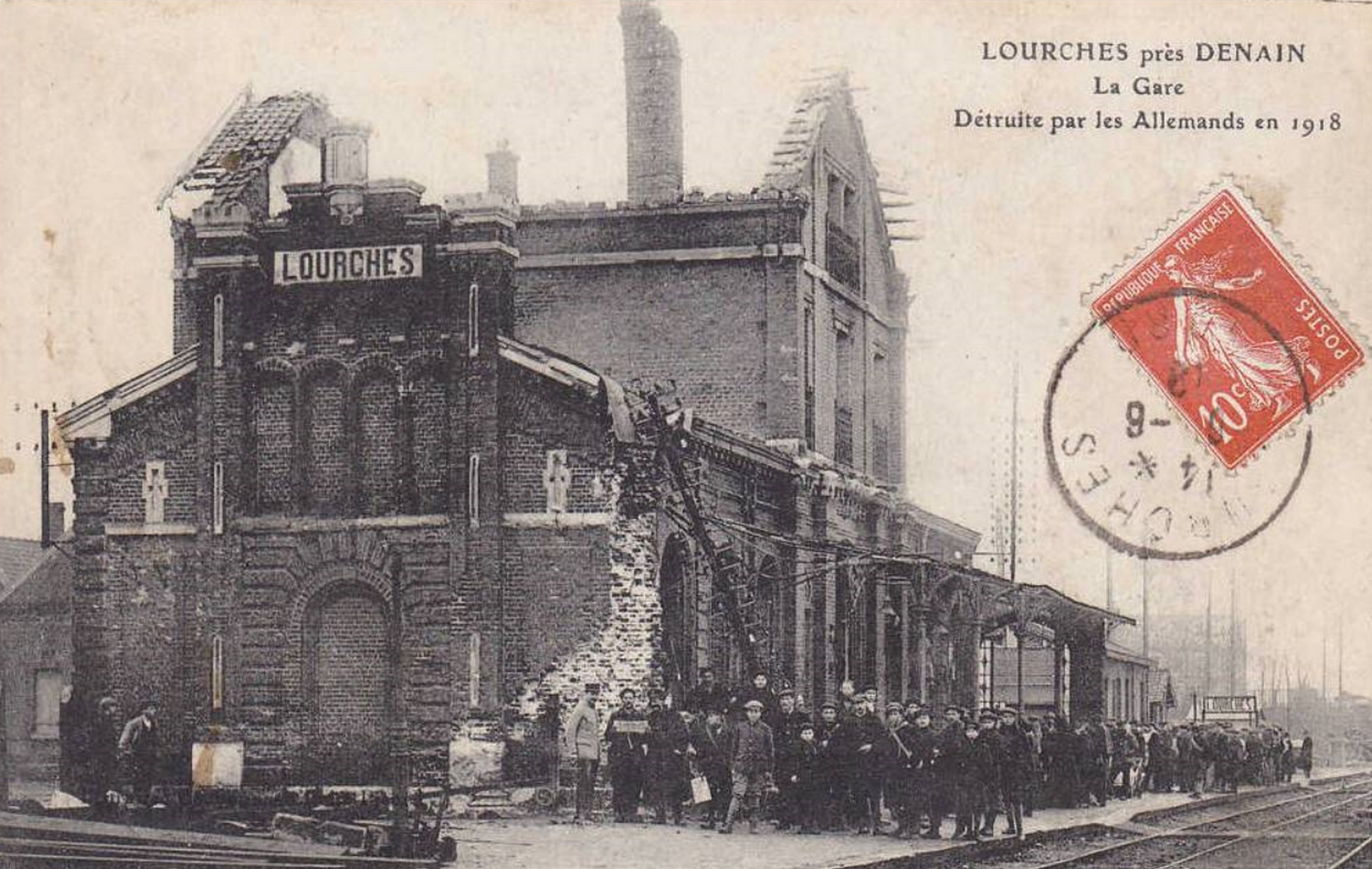 Gare de Lourches, Rœulx, Nord, Nord-Pas-de-Calais, France.